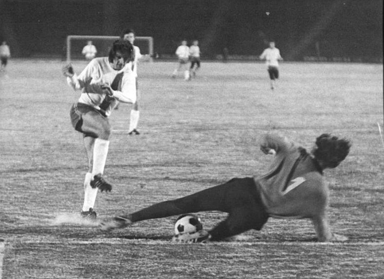 ADN-ZB-Kluge- -17.12.75-sta-Leipzig: FDGB-Fußballpokal. Viertelfinal-Rückspiel. 1. FC Lok Leipzig - FC Carl Zeiss Jena 4:1- FCL-Stürmer Rainer Lisiewicz (l.) scheitert hier bei einem der Leipziger Konterangriffe an Jenas Torwart Hans-Ulrich Grapenthin. Die erste Begegnung endete mit einem 3:2 - Sieg der Leipziger.